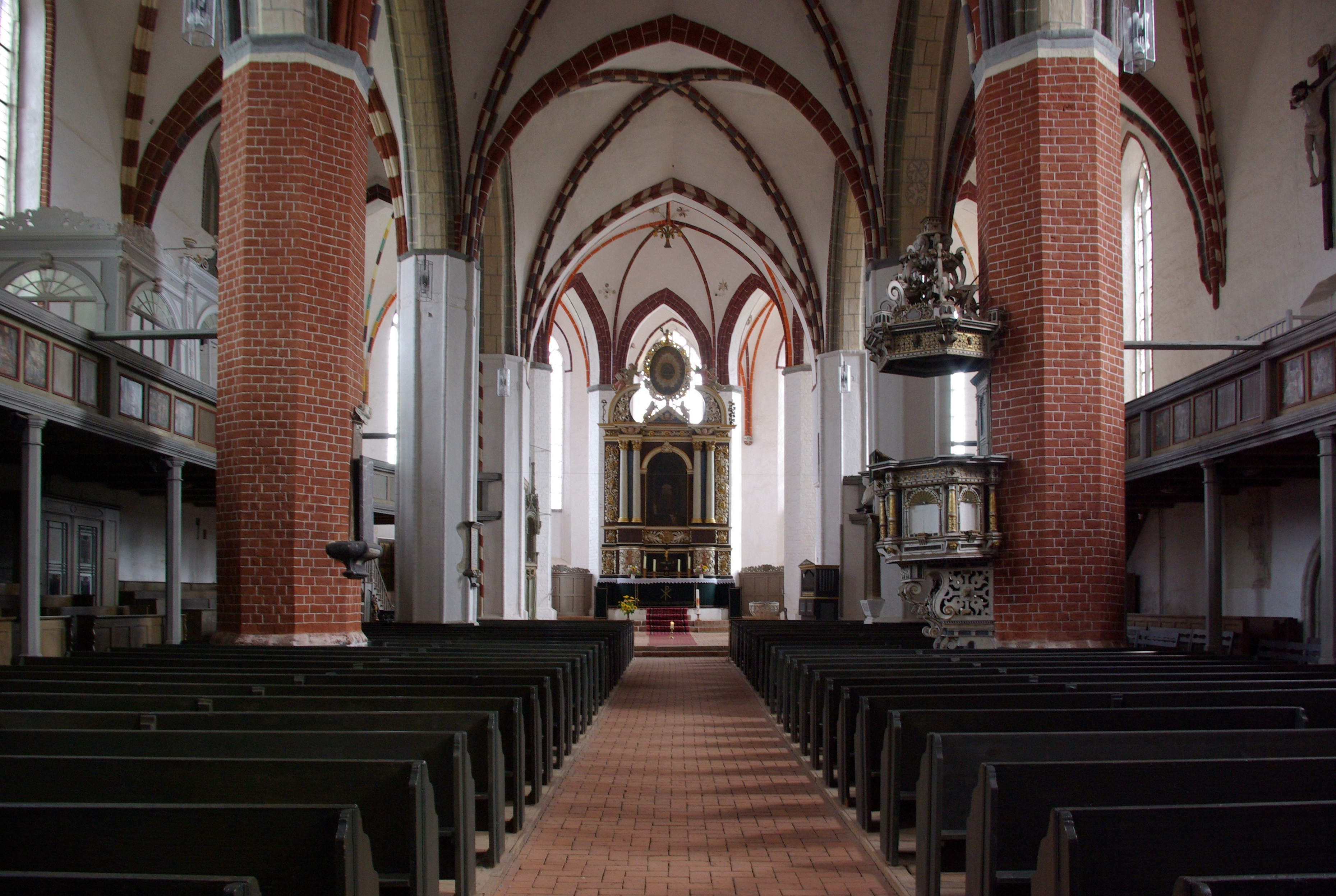 Jüterbog in Brandenburg. Der Innenraum der Kirche mit dem Altar. An der rechten Säule ist die Kanzel zusehen. An beiden Seiten befinden sich die Emporen.